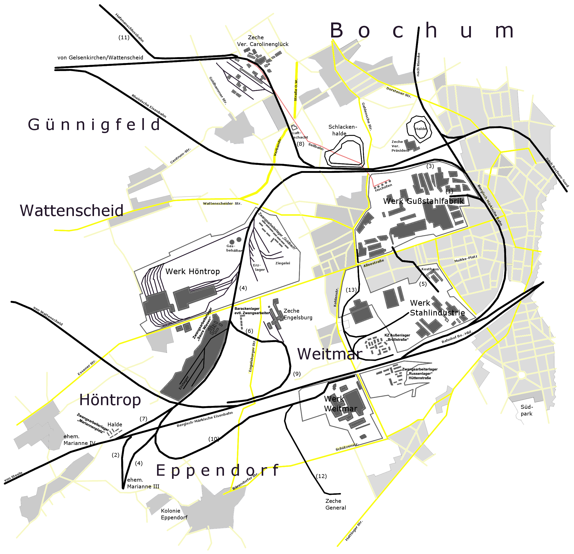 Lage der Werksteile und Bahnanlagen des Bochumer Vereins 1945 Anschluß der Gußstahlfabrik BME Bochum-Riemke 1867/68 Zeche Marianne an BME Steele-Bochum 1869/70 Gußstahlfabrik an Rheinische Eisenbahn 1873 Zeche Marianne an RhE und Gußstahlfabrik 1878 Gußstahlfabrik an die Stahlindustrie 1889/90 (Zahnradbahn) Zeche Engelsburg an die Gußstahlfabrik 1890/91 Zeche Marianne Schacht IV an Gußstahlfabrik 1891 Zeche Carolinenglück an die Gußstahlfabrik 1900 Zeche Engelsburg an die BME Steele-Bochum 1907/08 Gußstahlfabrik an Werk Weitmar 1926/27 Hafen Grimberg an Gußstahlfabrik 1929 Werk Weitmar an Hasenwinkler Kohlensammelbahn über Zeche General 193x Gußstahlfabrik an Stahlindustrie 1930-34 (Friktion)